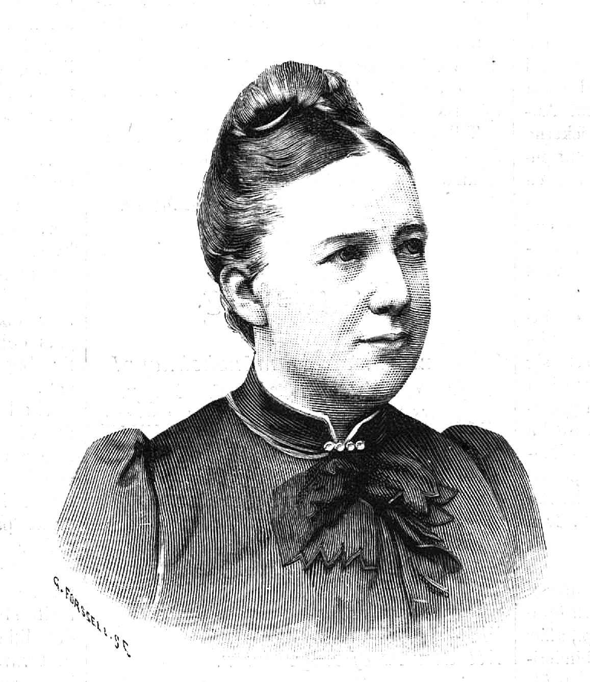 Sofia Gumaelius (1840-1915)